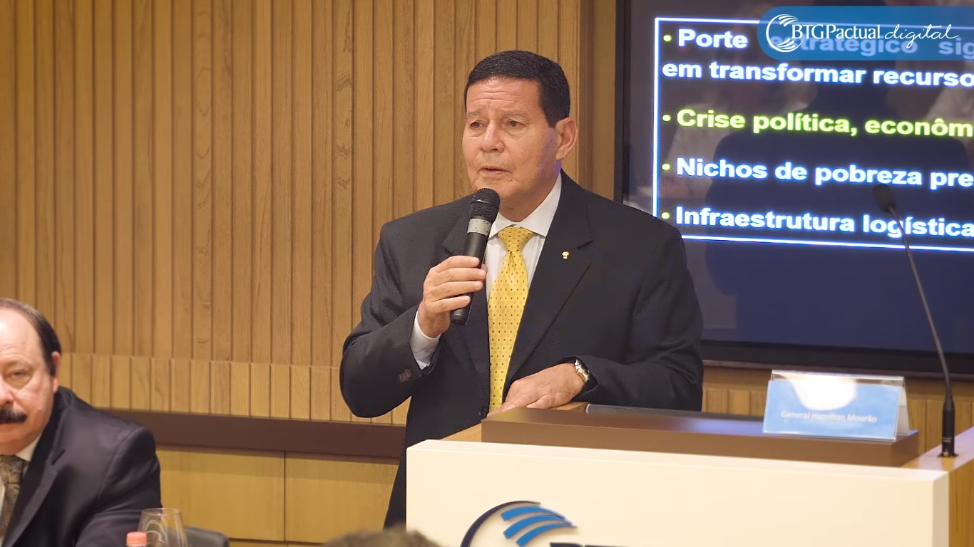 Confira na íntegra a palestra do General Hamilton Mourão (PRTB), candidato a vice-presidência de Jair Bolsonaro no BTG Pactual, onde falou sobre temas políticos.